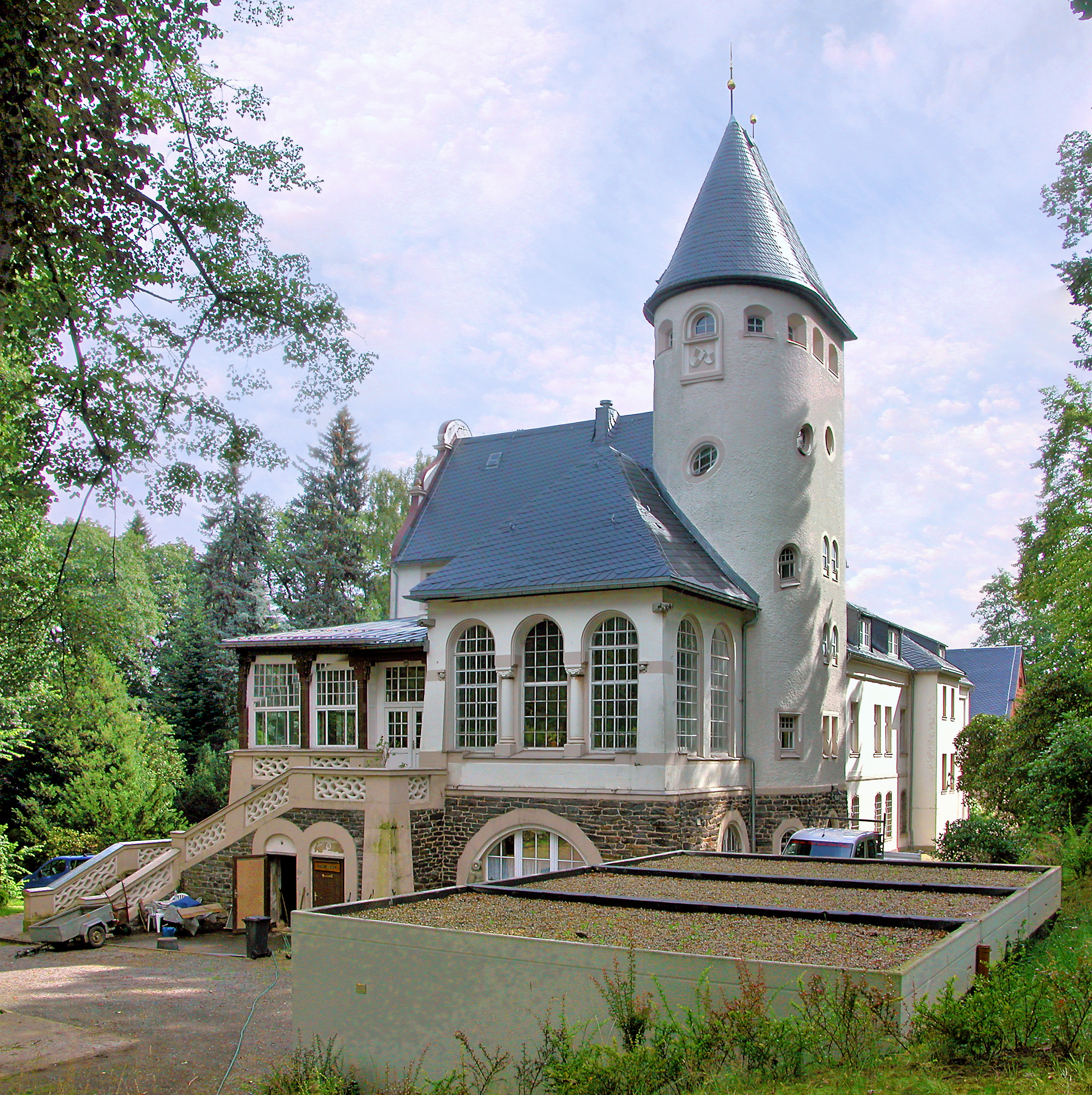 22.07.2009 09514 Lippersdorf (Pockau-Lengefeld), Hauptstraße 50 (GMP: 50.755544,13.255955): Schloß, 1761 unter Georg Heinrich von Berbisdorf erbaut. 1924 erwarb die Stadt Chemnitz das Schloß und richtete nachfolgend ein Kindererholungsheim ein, das als Kinderheim Lippersdorf noch heute besteht. Parkseite. [DSCN38261-38262.TIF]20090722075MDR.JPG(c)Blobelt